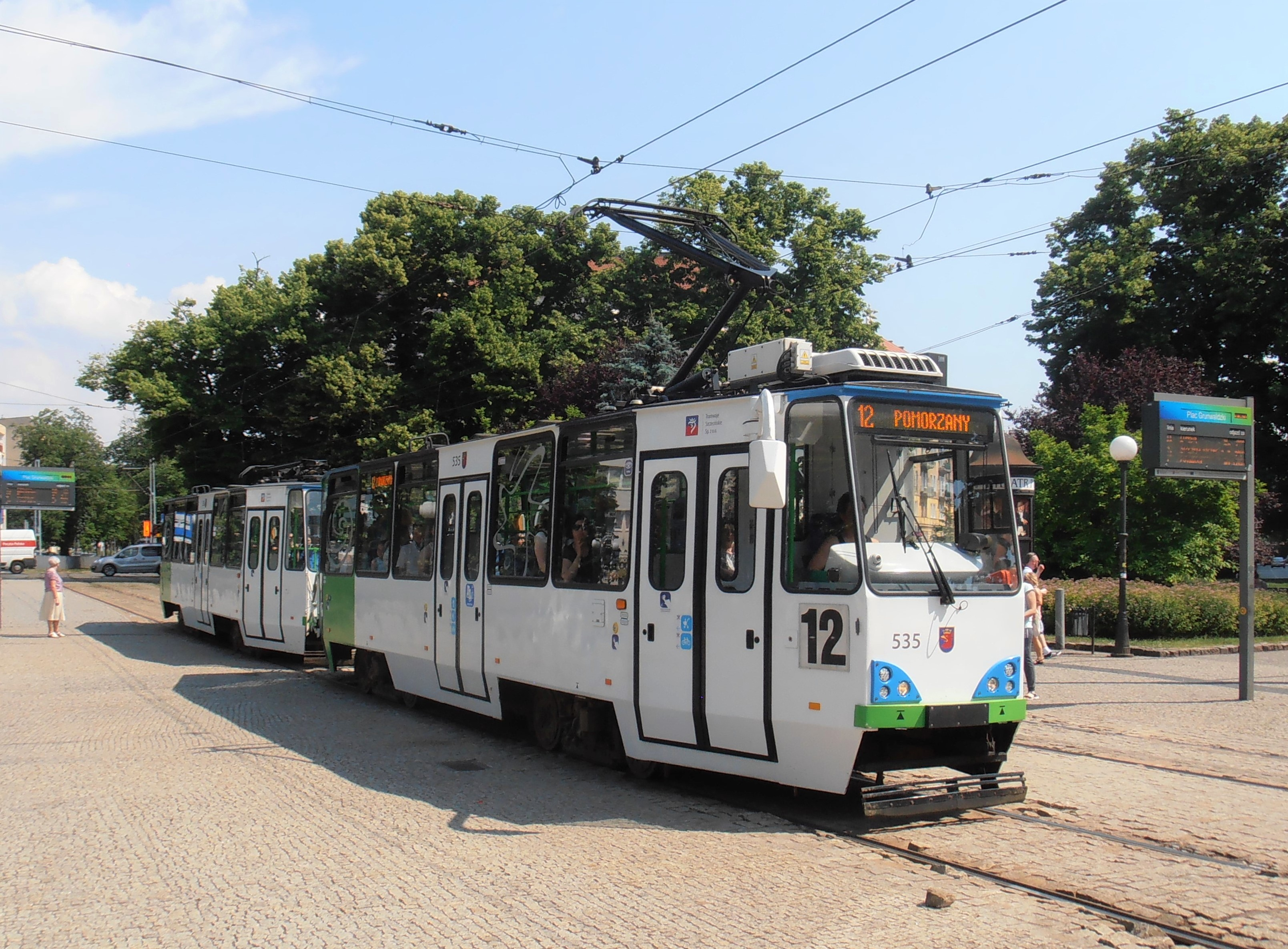 Skład wagonów typu 105Ng2015 w Szczecinie, czerwiec 2018